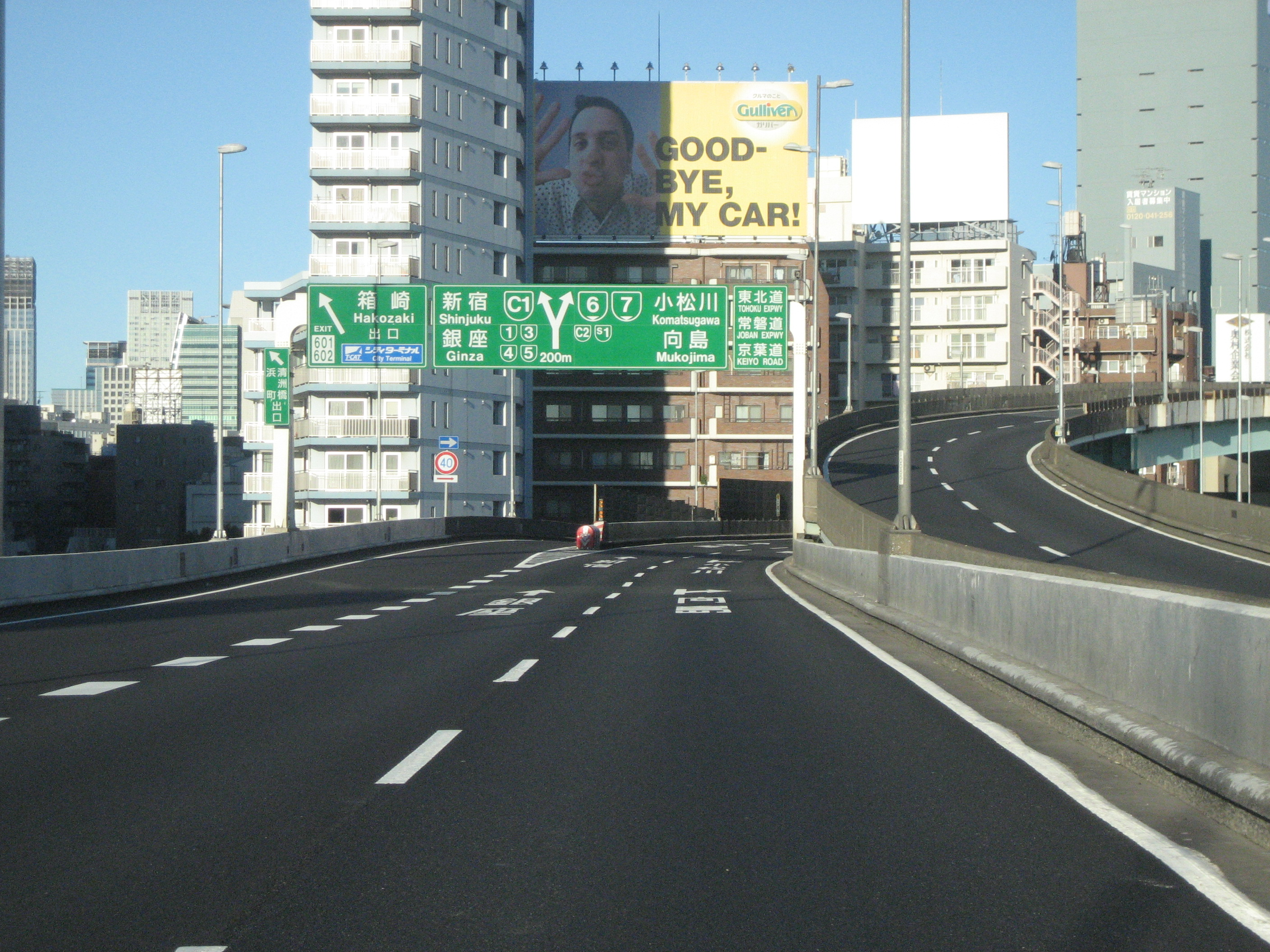 首都高速箱崎出入口（上り）